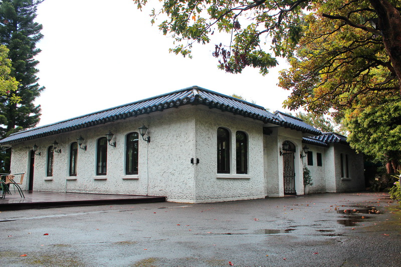 林語堂故居外觀。